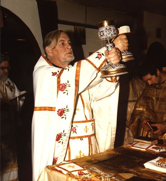 Српски (ћирилица): Отац Александар Шмеман са путиром.